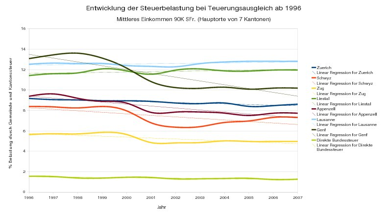 Visualisierung: Entwicklung der Steuerbelastung bei Teuerungsausgleich ab 1996 Belastung des Bruttoarbeitseinkommens durch Kantons-, Gemeinde- und Kirchensteuern für einen Verheirateten, unselbständig Erwerbenden mit Lohnausweis, ohne Kinder in der Schweiz. Basierend auf [1]